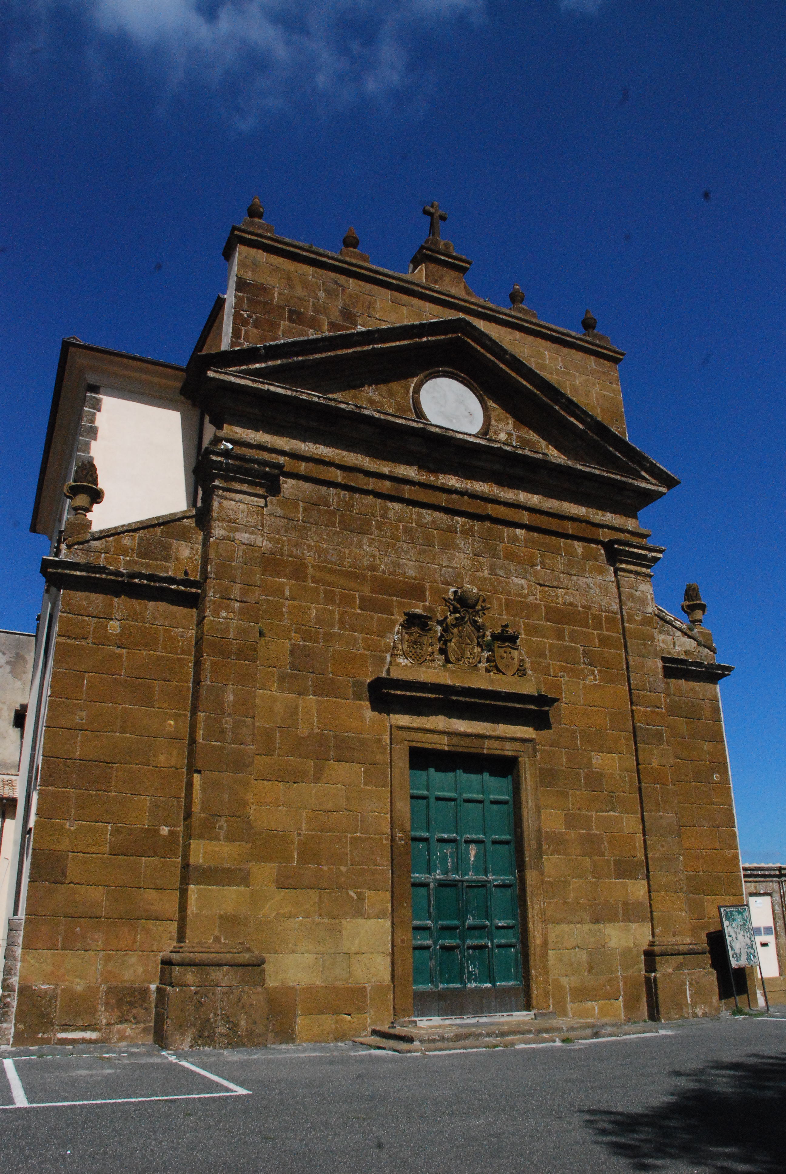 Convento di San Silvestro This is a photo of a monument which is part of cultural heritage of Italy.